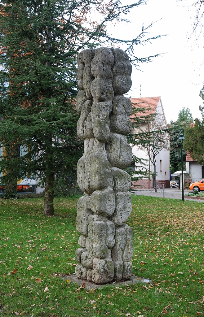 Muschelkalk-Skulptur Lebensbaum (1956) von László Szabó. Standort: Kulturhausgarten/Gerbersruhstraße, Wiesloch. Aufgestellt 1976 anlässlich einer Ausstellung des Künstlers im Kulturhaus Wiesloch